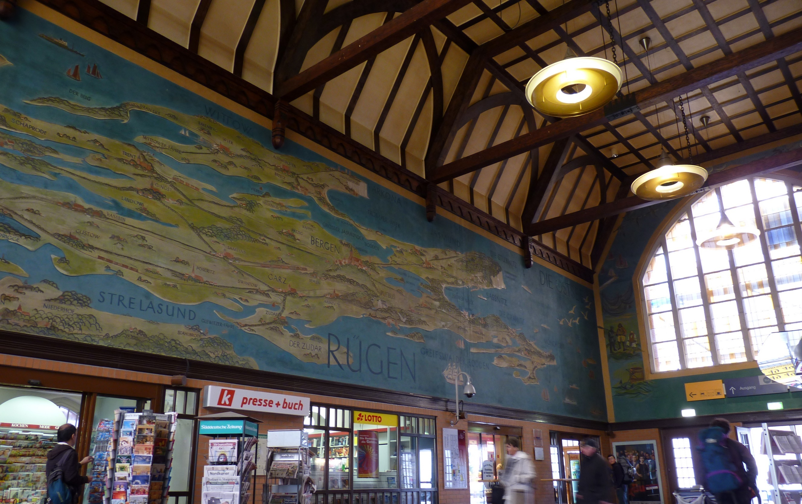 allgem. Neu gestaltet.